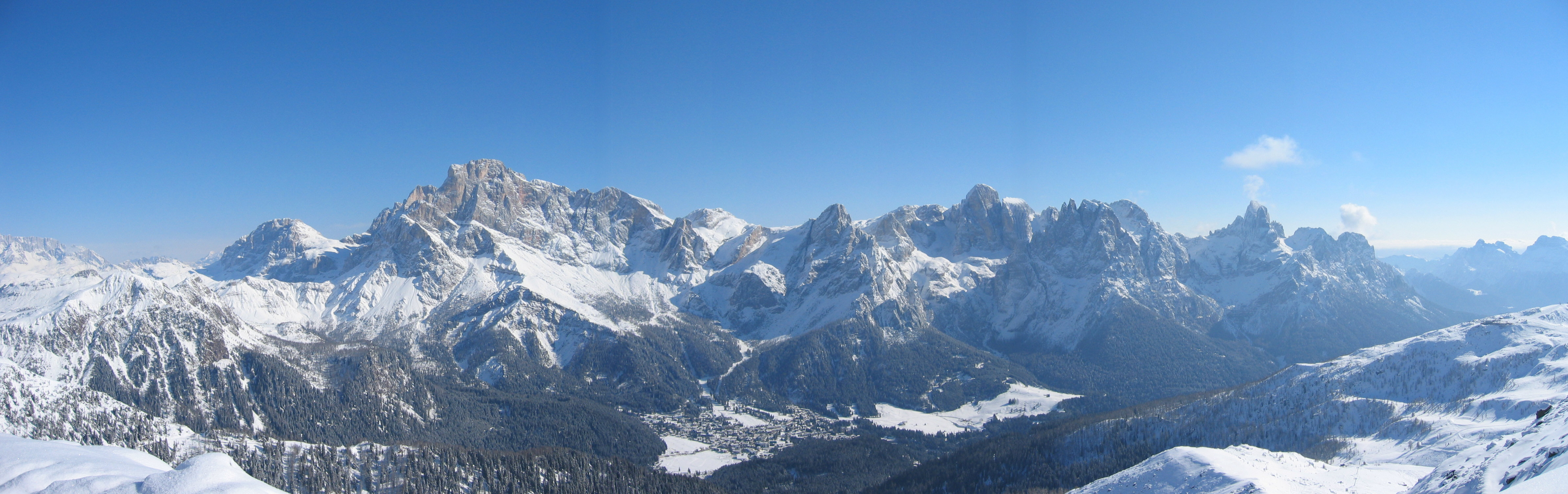 A panorama of Pale di San Martino di Castrozza, Dolomiti, Italy.